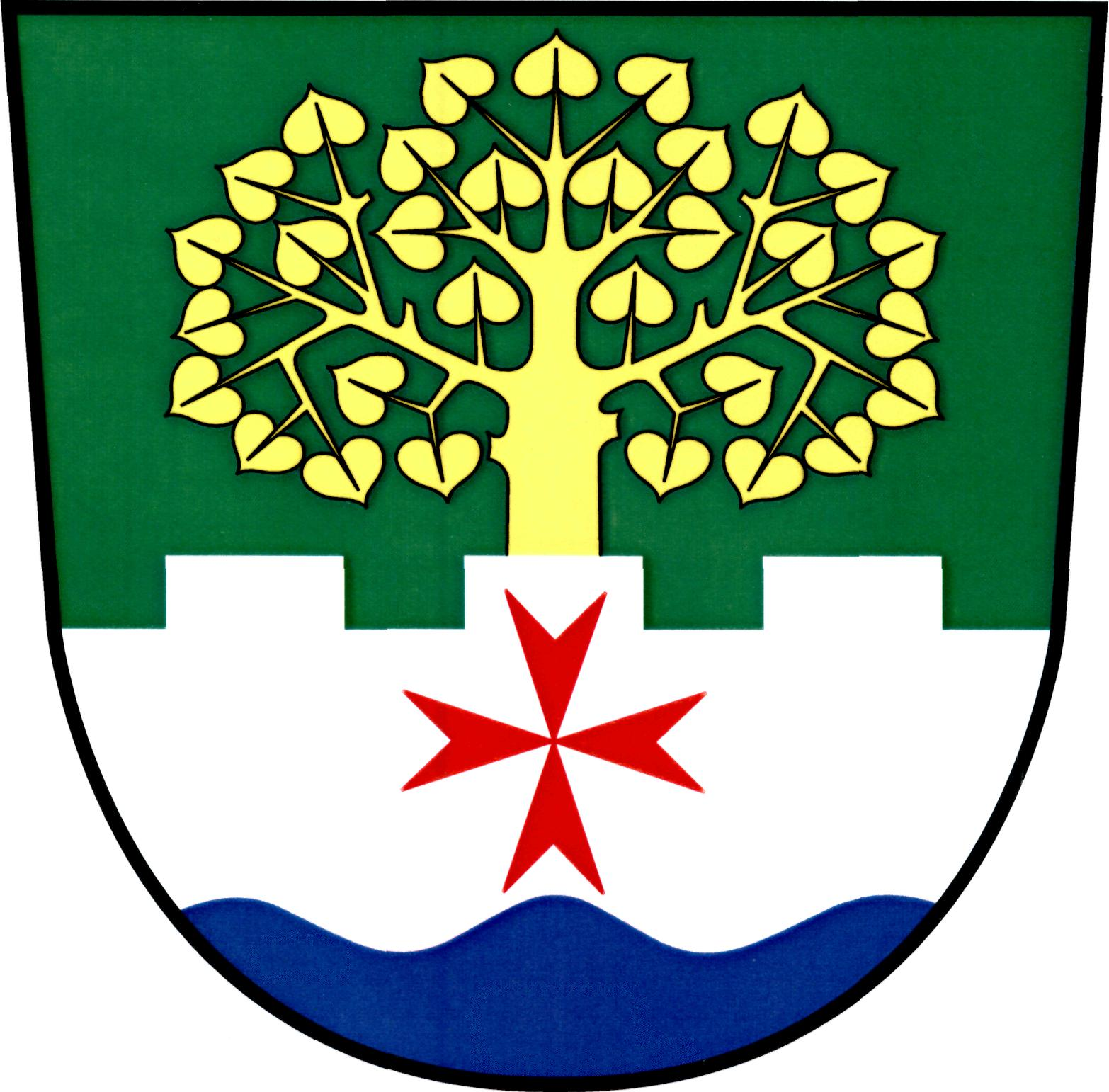 Znak obce Loukovec